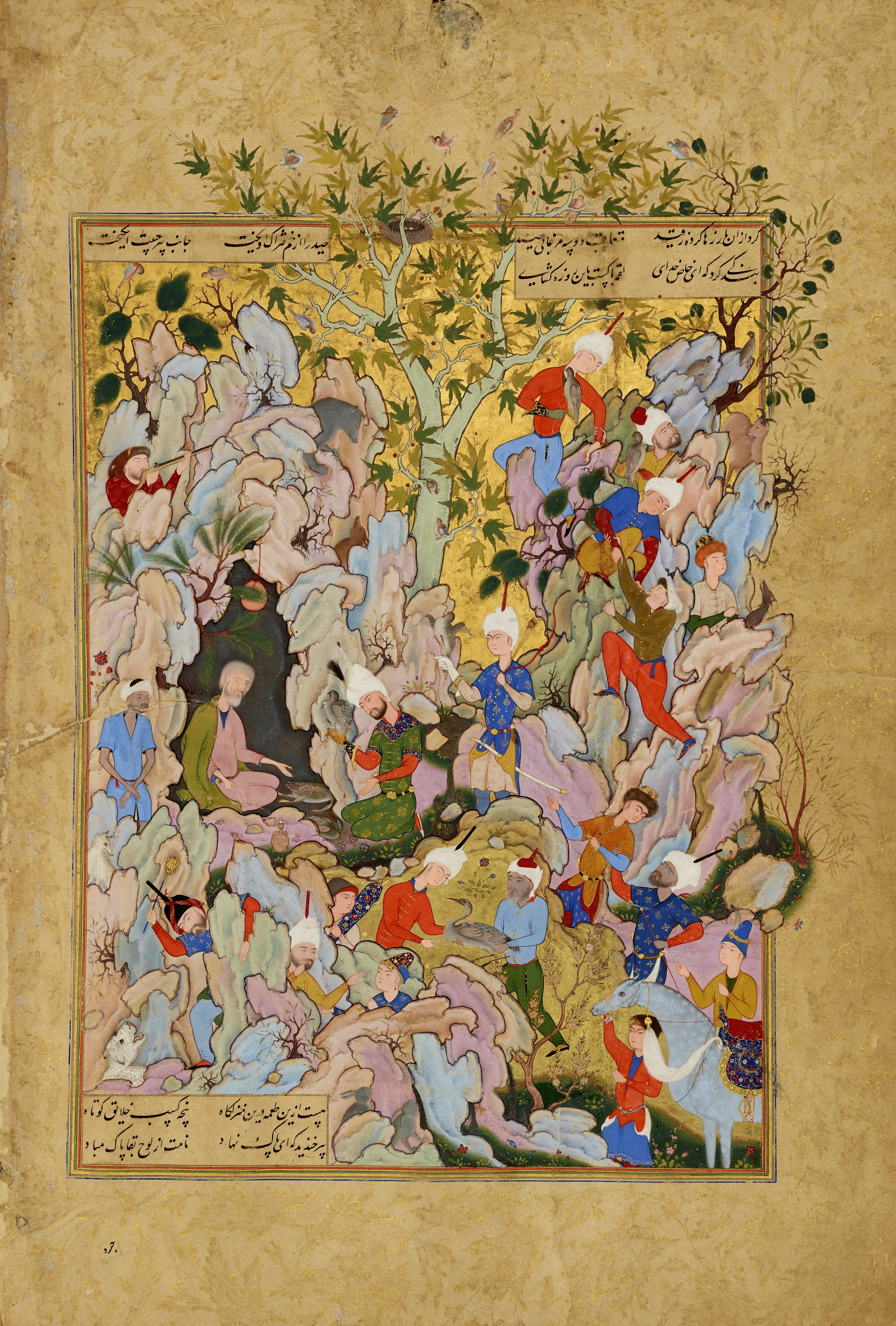 Мирза Али. Царь, ставший учеником мудреца-отшельника. «Хафт Ауранг» (Семь престолов) Джами. 1556-65гг. Галерея Фрир, Вашингтон